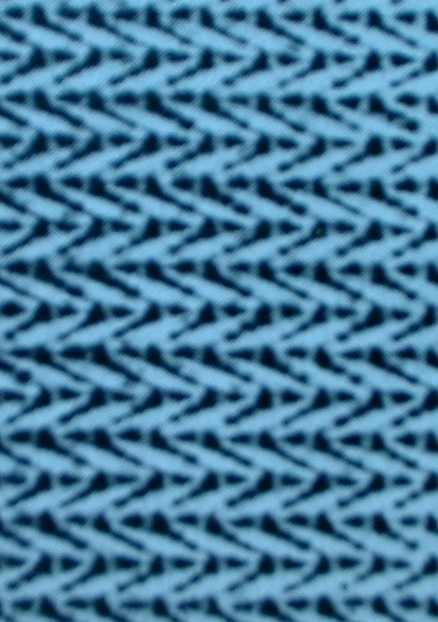 Linke Seite der Kettenwirkware Charmeuse